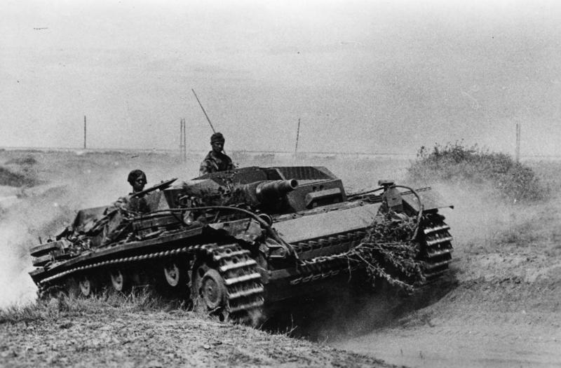 Russland, Kampf um Stalingrad, Sturmgeschütz Kampf um Stalingrad. PK-Aufnahme: Kriegsberichter Schröter-Altvater (Sch) o.Nr. "Fr" OKW "Fr.f.D." Sept. 42 [Herausgabedatum] [Sowjetunion.- Schlacht um Stalingrad.- Sturmgeschütz III (StuG III)]